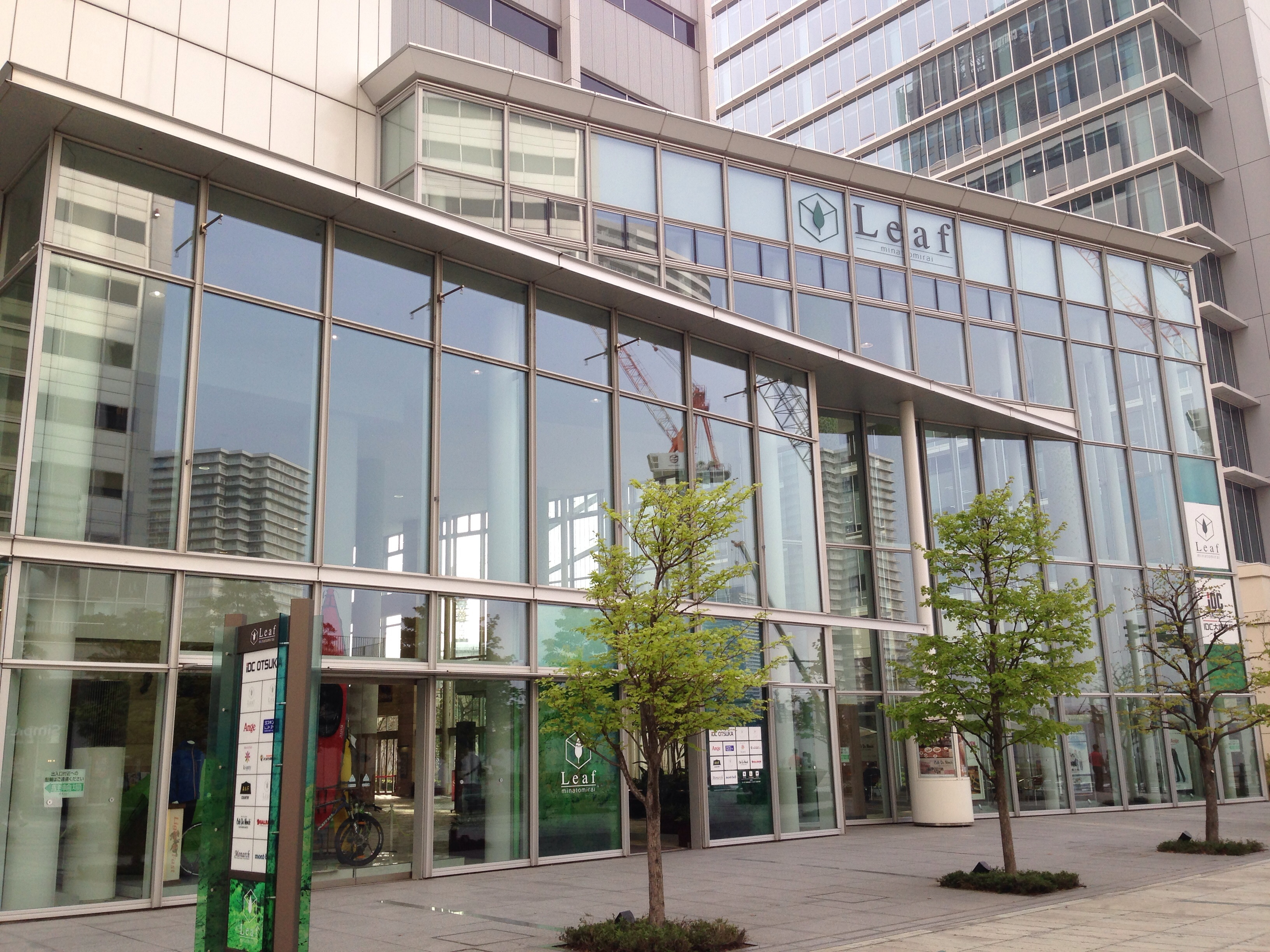 横浜みなとみらい地区の商業ビル「リーフみなとみらい」。東側のグランモール公園沿いにある商業施設入り口、葉（Leaf）をイメージした当施設のロゴマークが掲げられている。